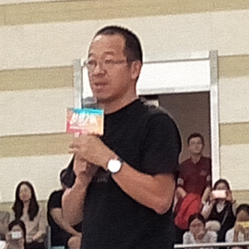 俞敏洪在兰州大学演讲，2018年5月13日